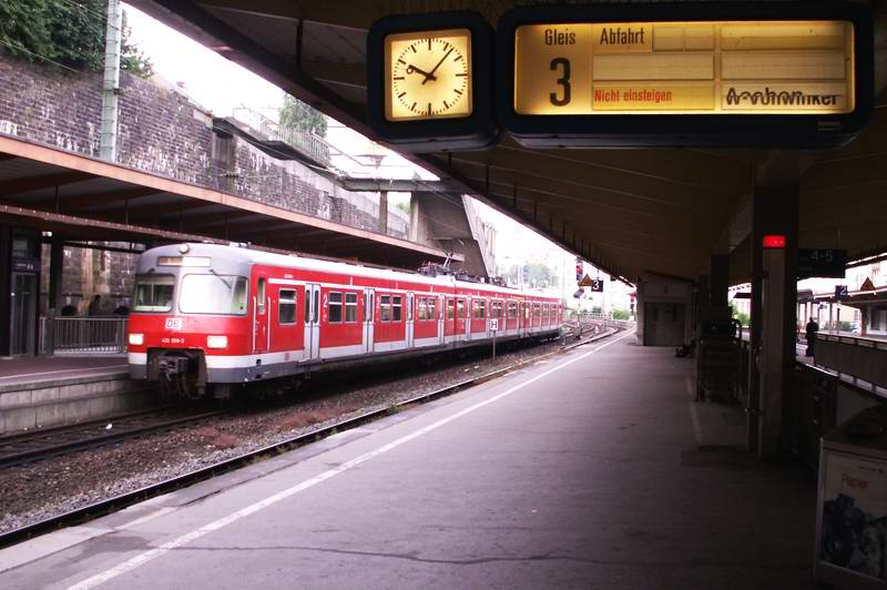 ET 420 der S-Bahn Rhein-Ruhr in Wuppertal Hbf